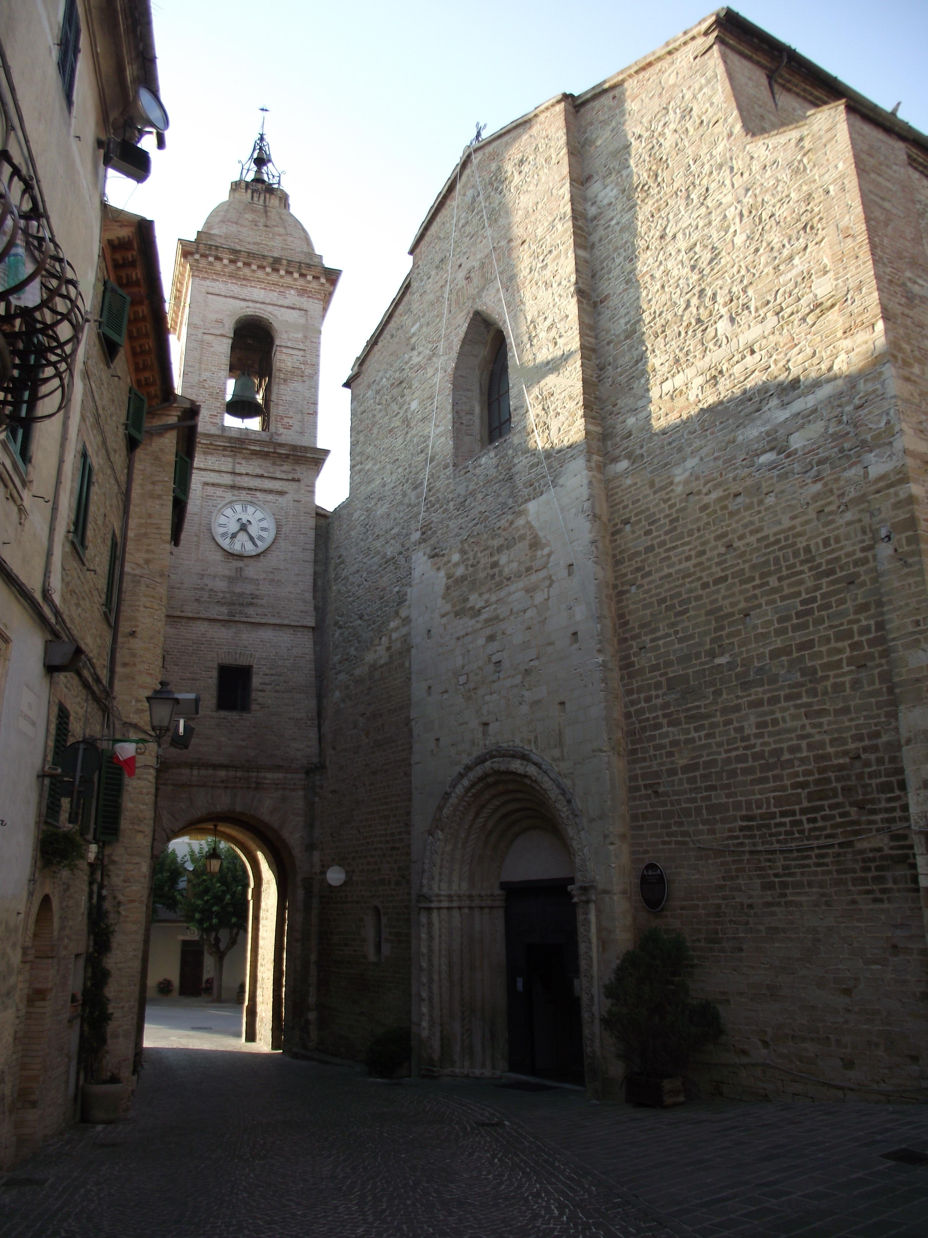 Chiesa parrocchiale di Sant'Egidio, XII-XIII secolo, e Torre Civica